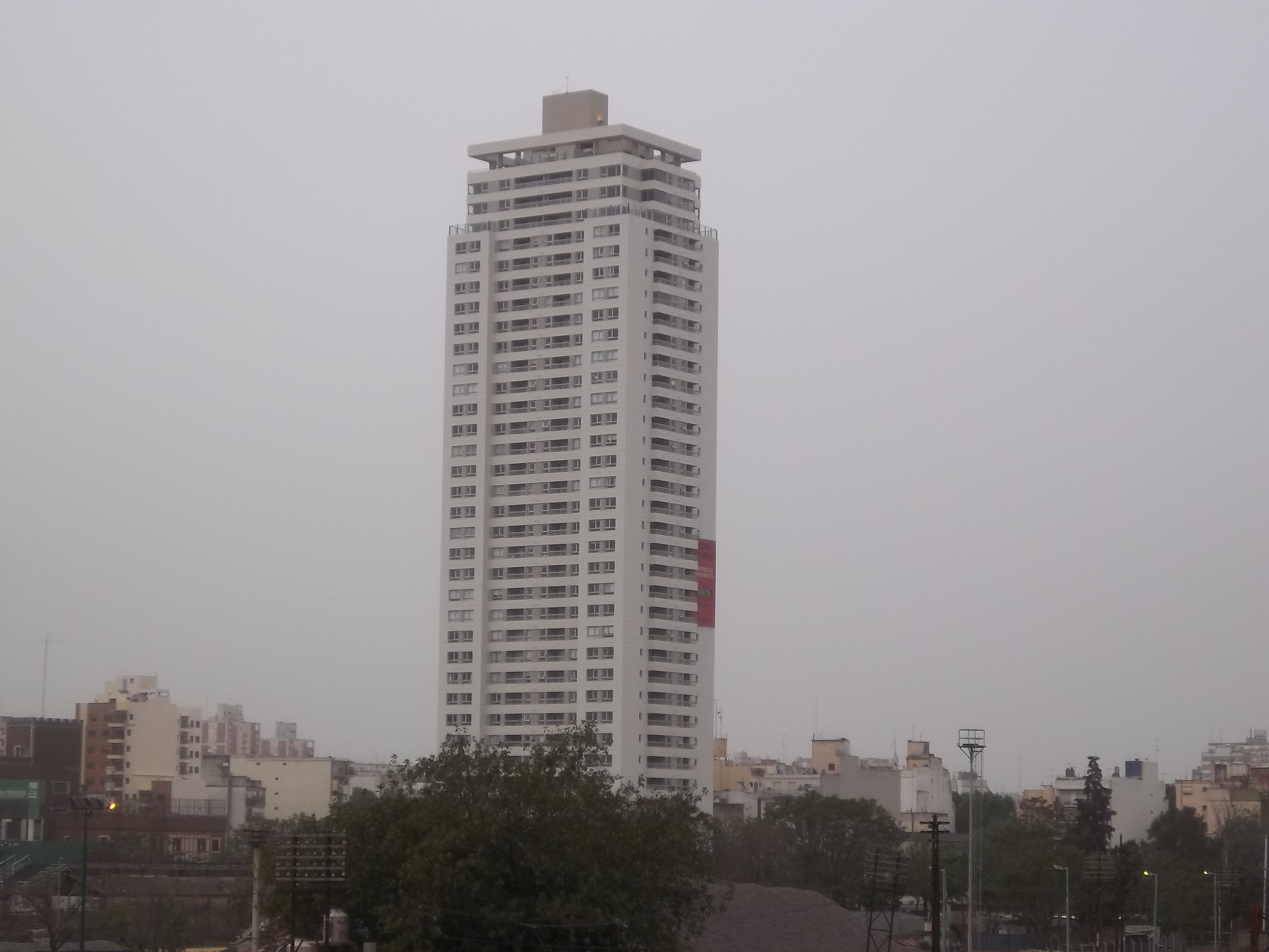 Torre Dosplaza I desde el Puente Caballito en el barrio de Caballito, ciudad de Buenos Aires, Argentina.